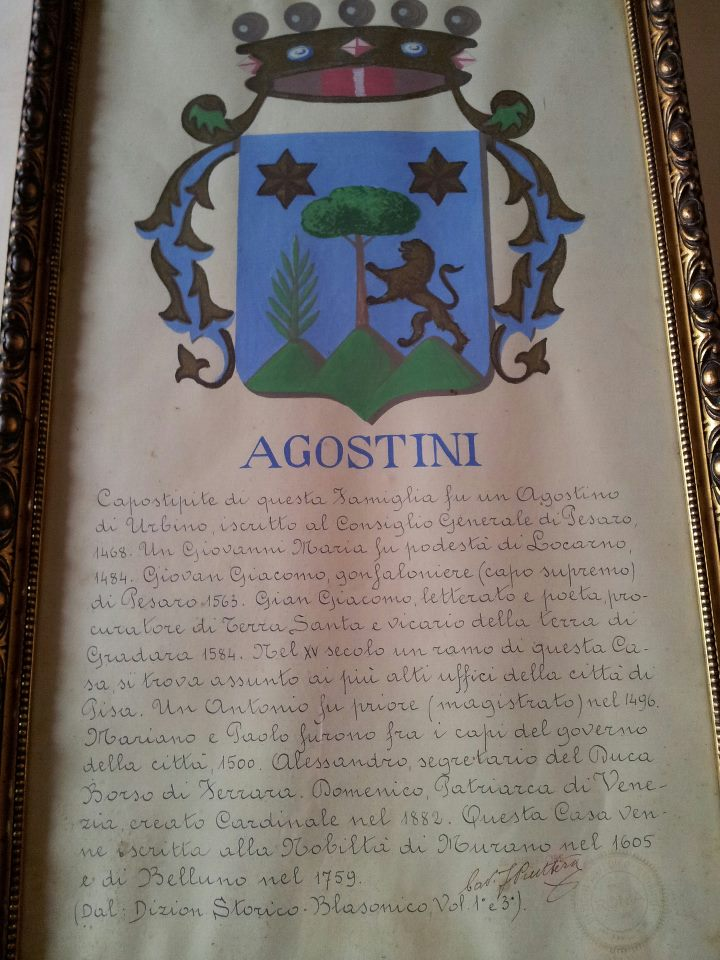 Riccardo Agostini, Pesaro.